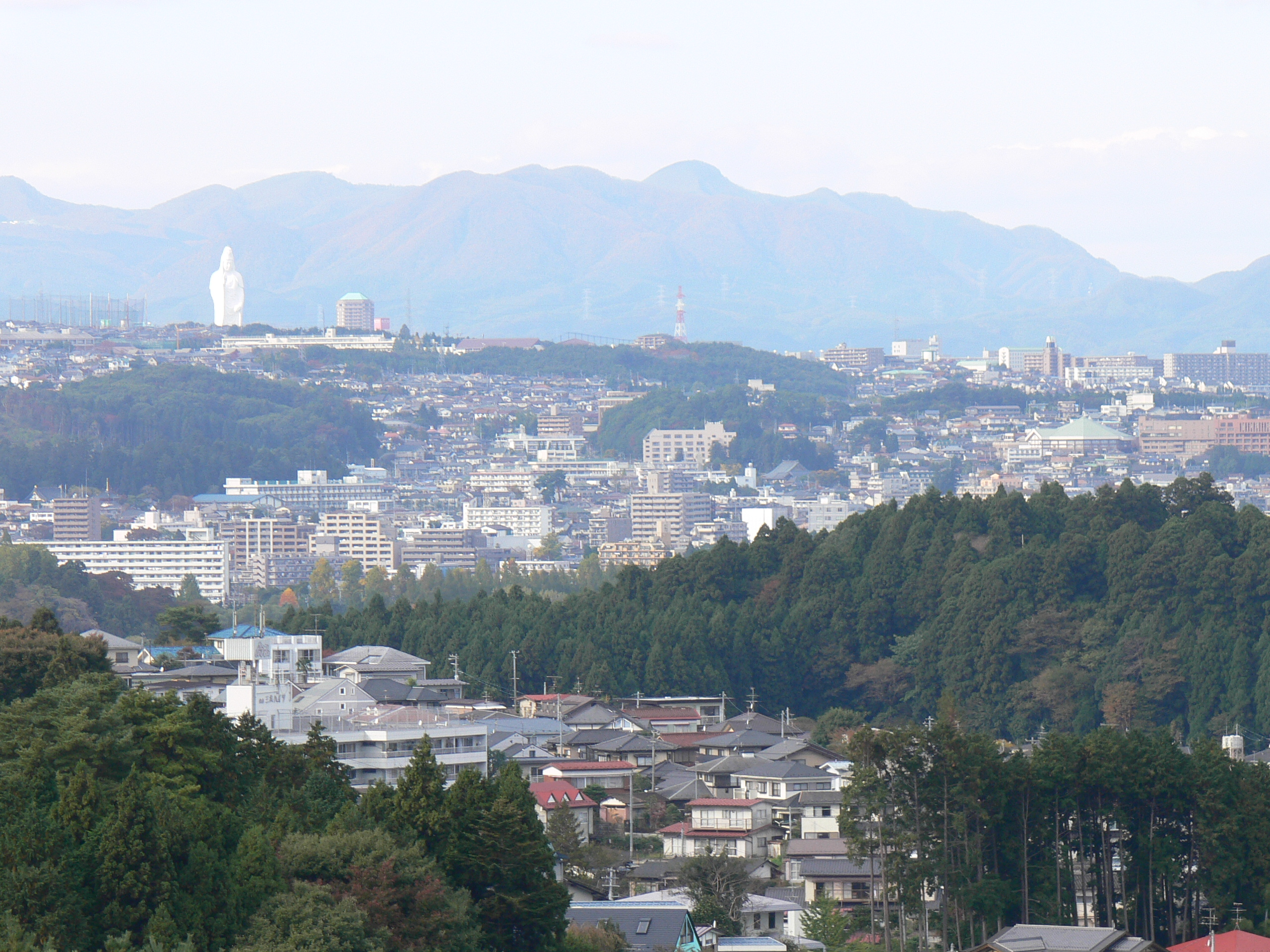 大年寺寺山公園から国見方面